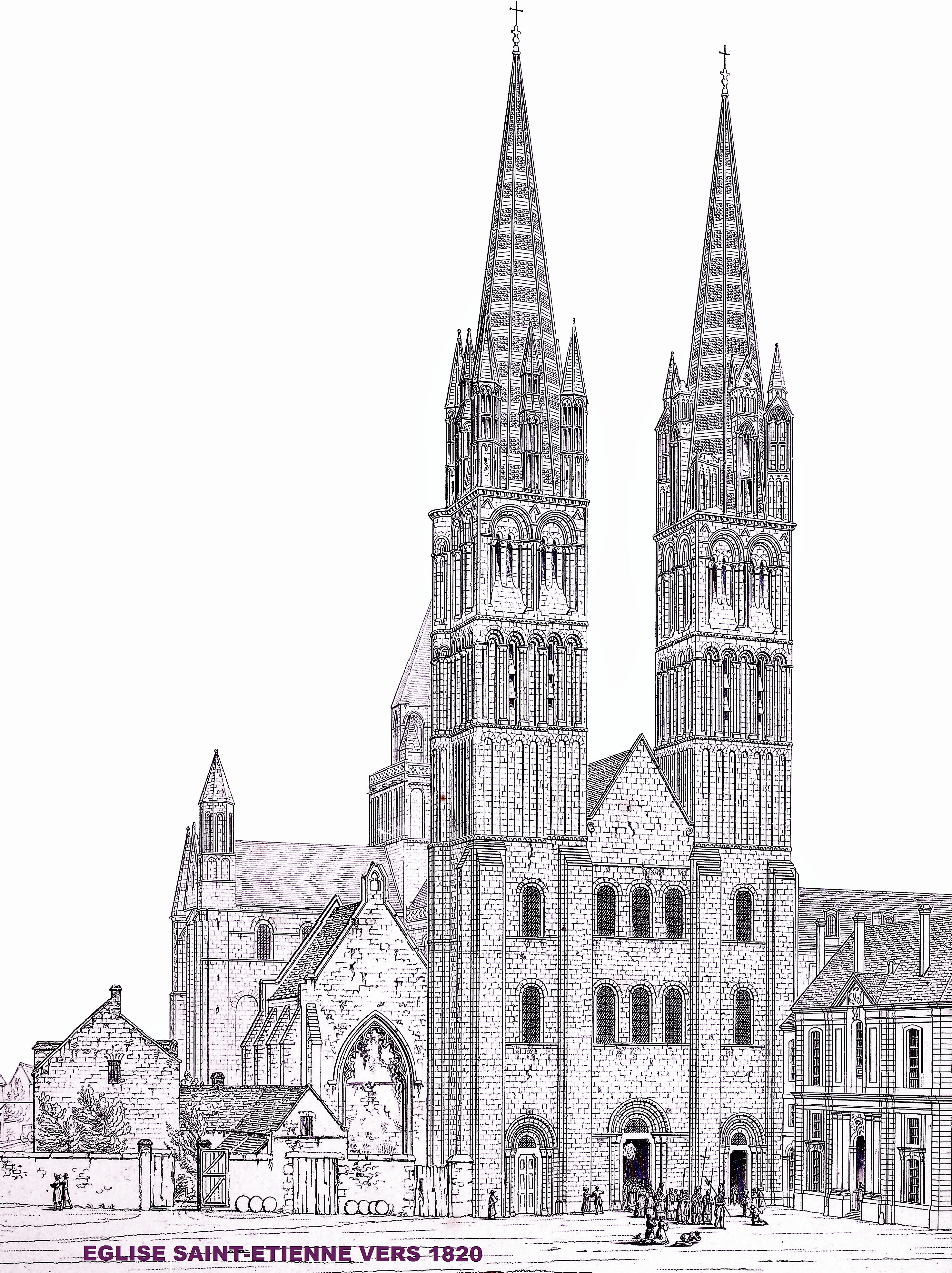 Abbaye aux hommes, Façade vers 1820 (image du domaine public modifiée (John Britton)